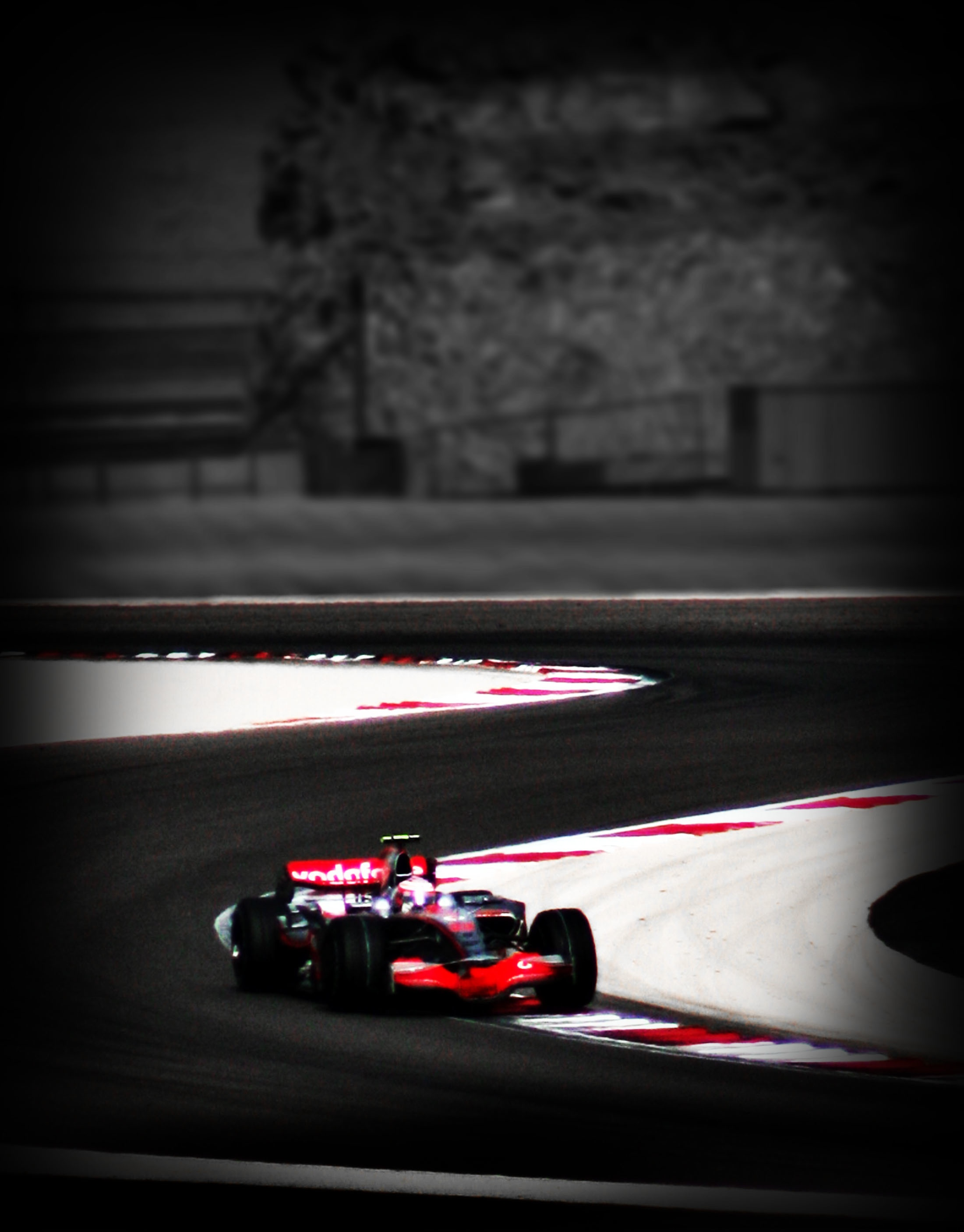 Heikki Kovalainen at the 2008 Bahrain Grand Prix.